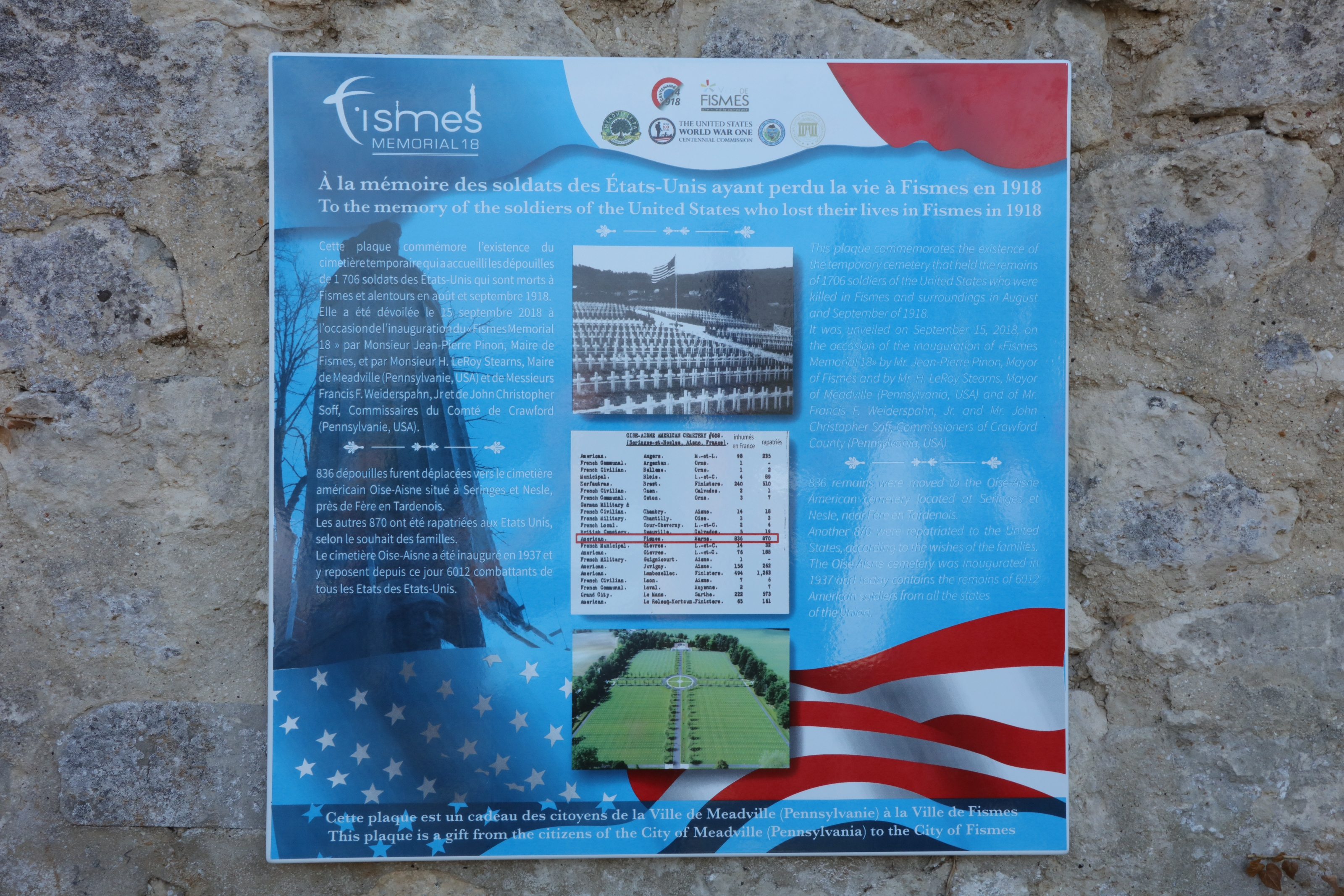 Plaque Commémorative